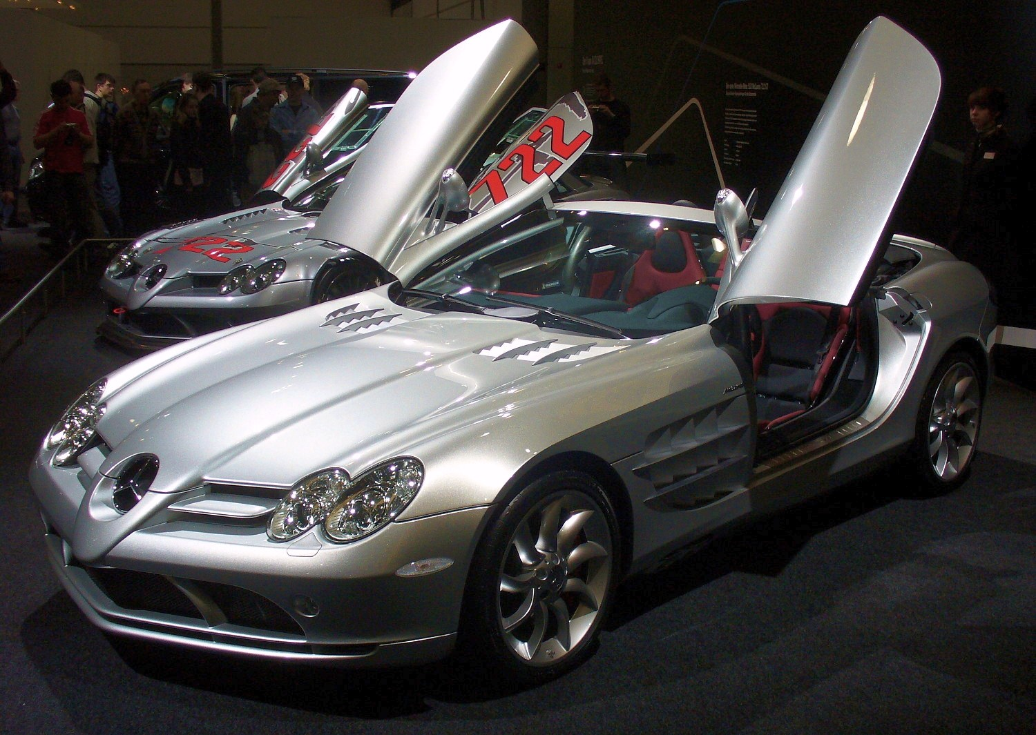 Mercedes-Benz SLR McLaren Roadster